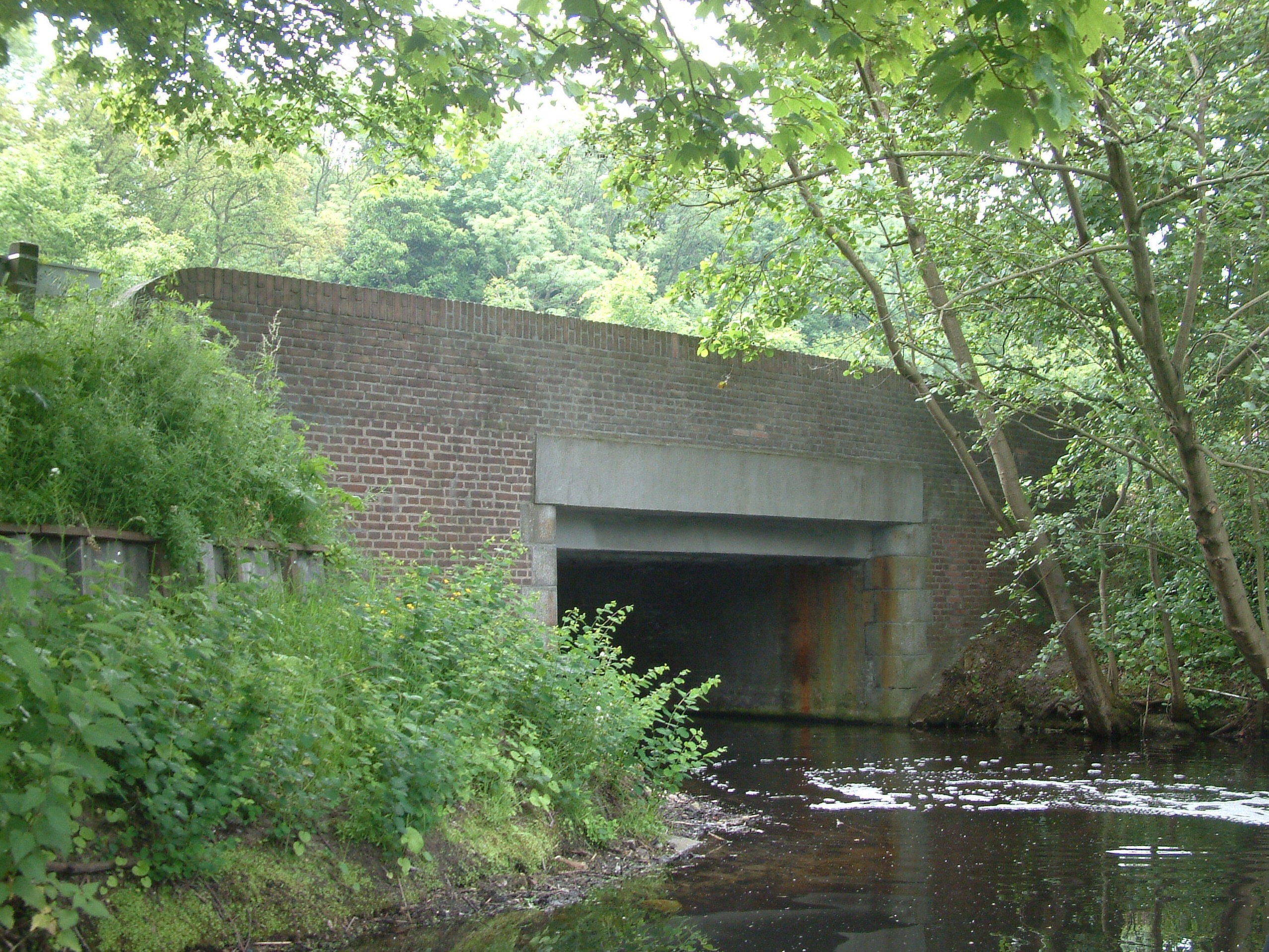 Bridges in The Hague as mentioned in the filename.